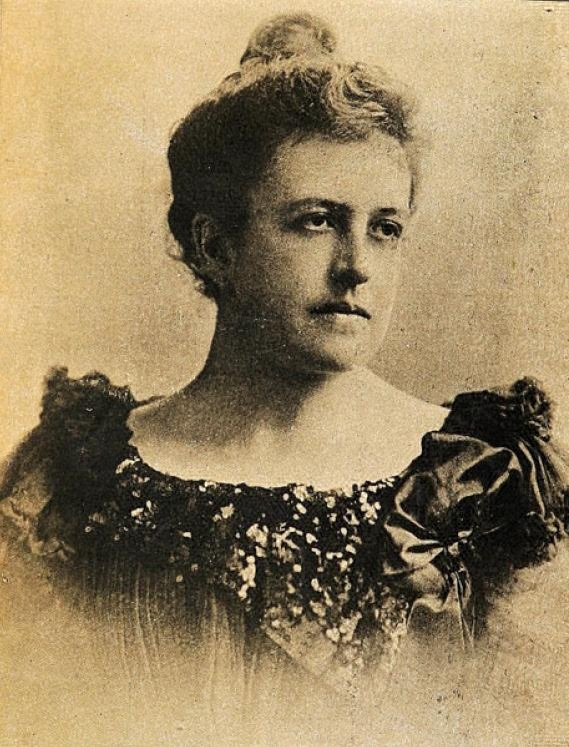 María Errázuriz Echaurren (circa 1860 - circa 1930) fue primera dama de Chile entre 1901 y 1906.